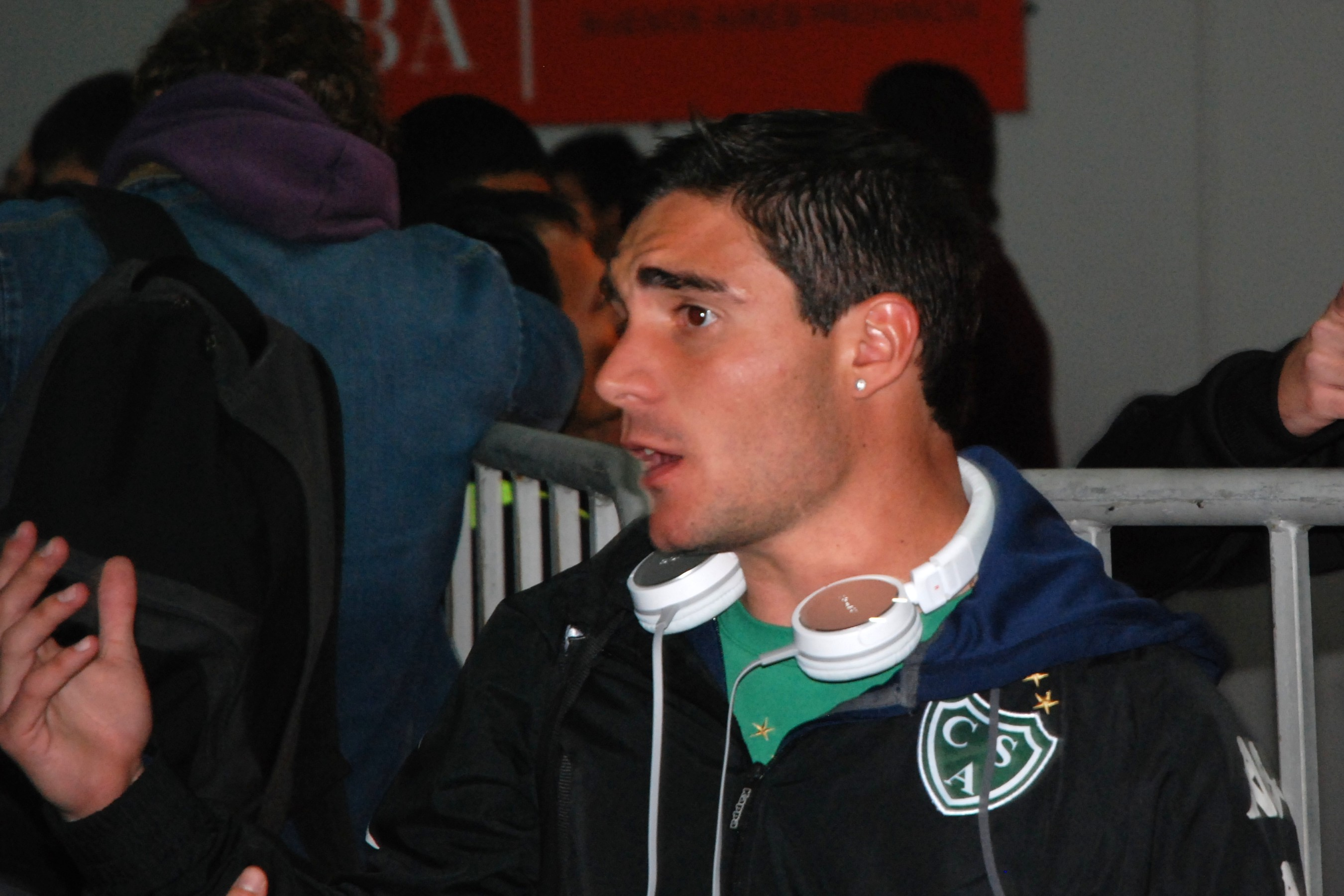 Ezequiel Cerutti, jugador de fútbol del Club Atlético Sarmiento de Junín luego del partido disputado ante Gimnasia y Esgrima La Plata en el Estadio Ciudad de La Plata, el 15 de junio de 2013, correspondiente a la última fecha del campeonato de Primera B Nacional 2012-2013.